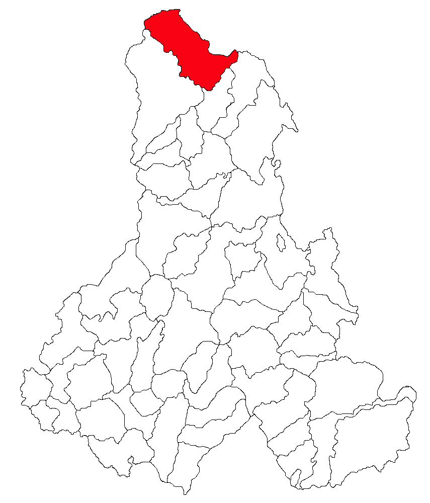 Categorie:Hărţi ale judeţului Harghita Contents 1 Licensing 2 Sursă 3 Licensing 4 Original upload log Licensing Sursă ro::Imagine:Harta_jud_Harghita.png